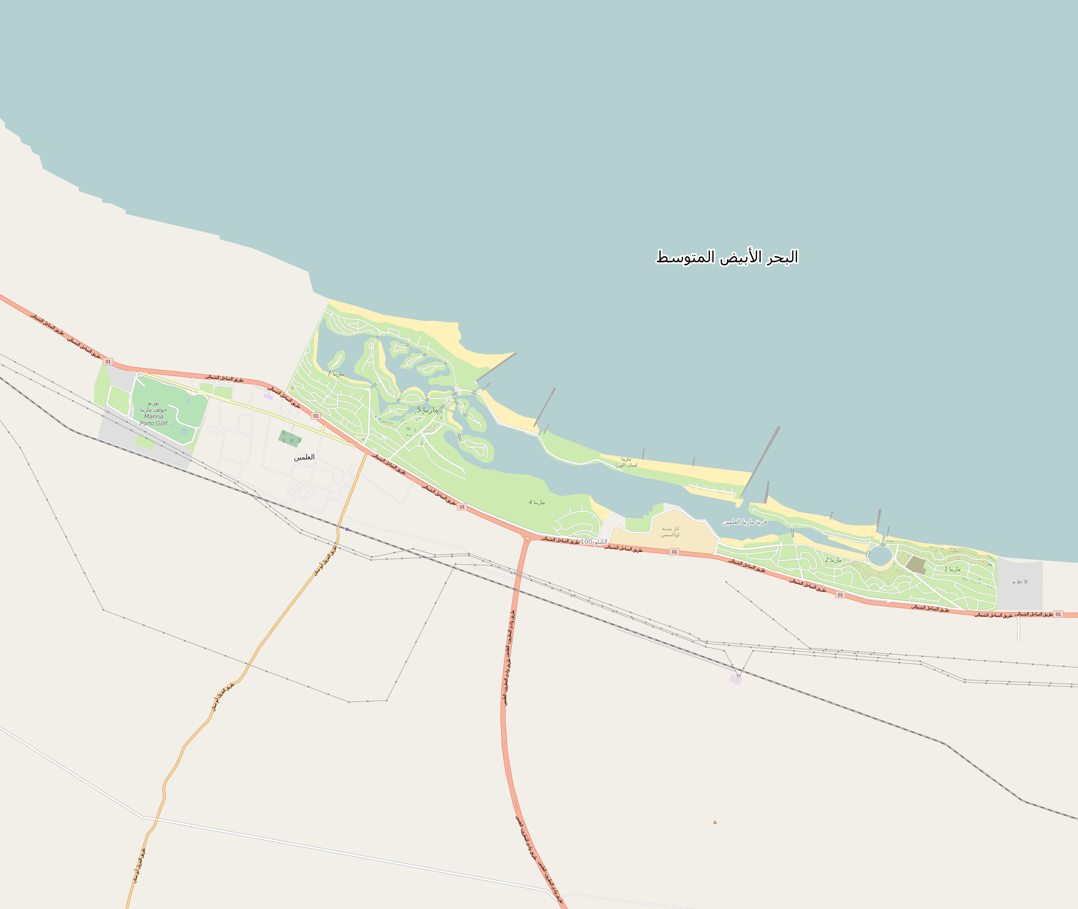 خريطة مدينة العلمين (تضم مارينا العلمين وجولف مارينا)، محافظة مطروح، مصر